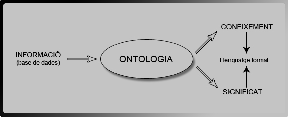 Esquema conceptual de com la ontologia genera un llenguatge mitjançant una extracció semàntica de conceptes bàsics.